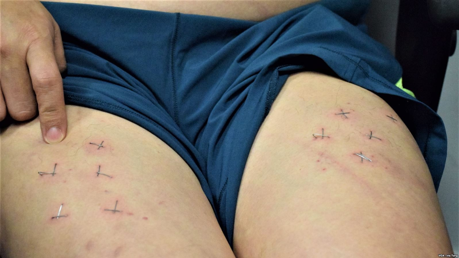 香港民主黨成員林子健展示兩條大腿上的釘書釘十字架傷痕